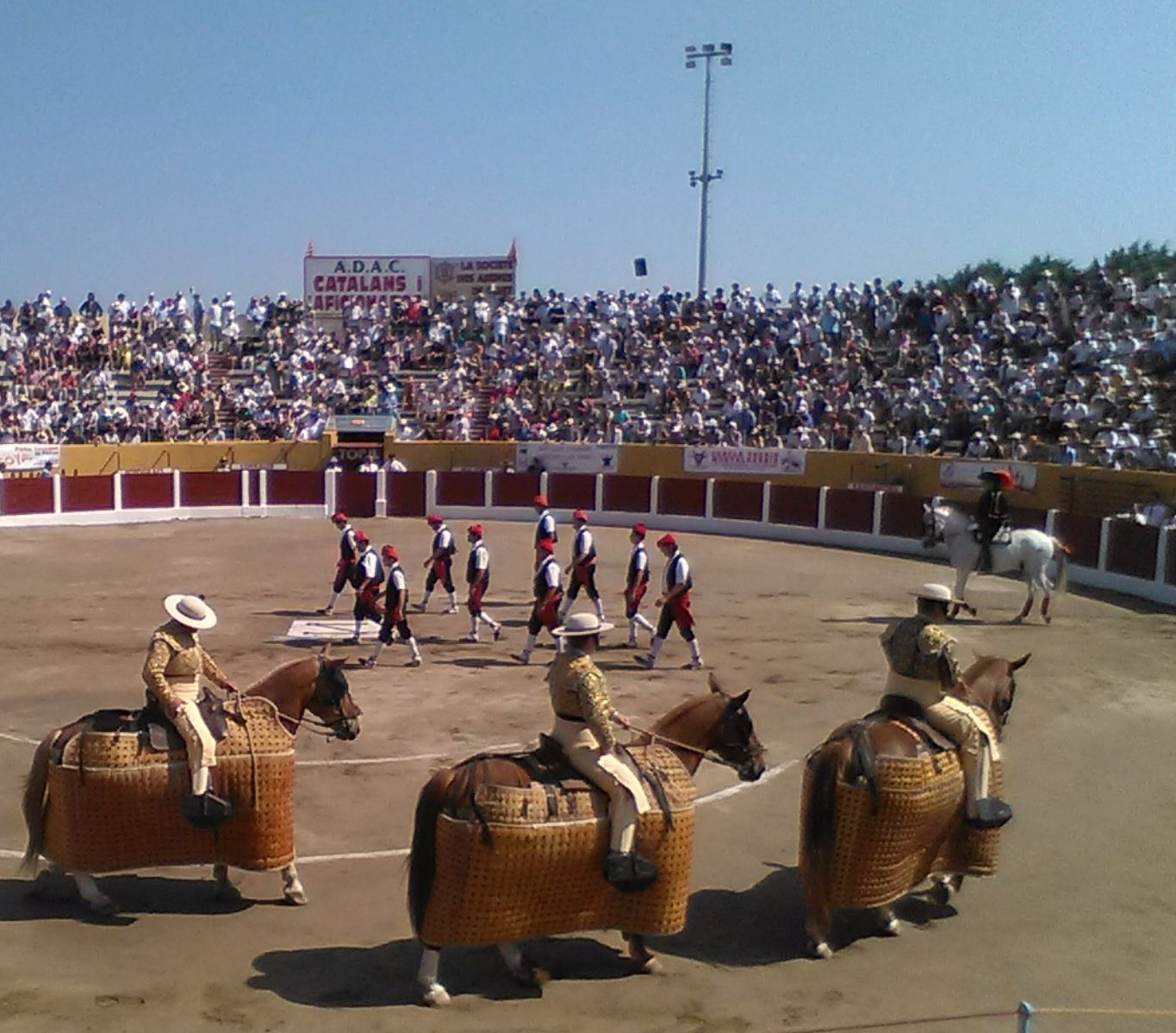 Paseo de la corrida du samedi matin durant la féria de Céret